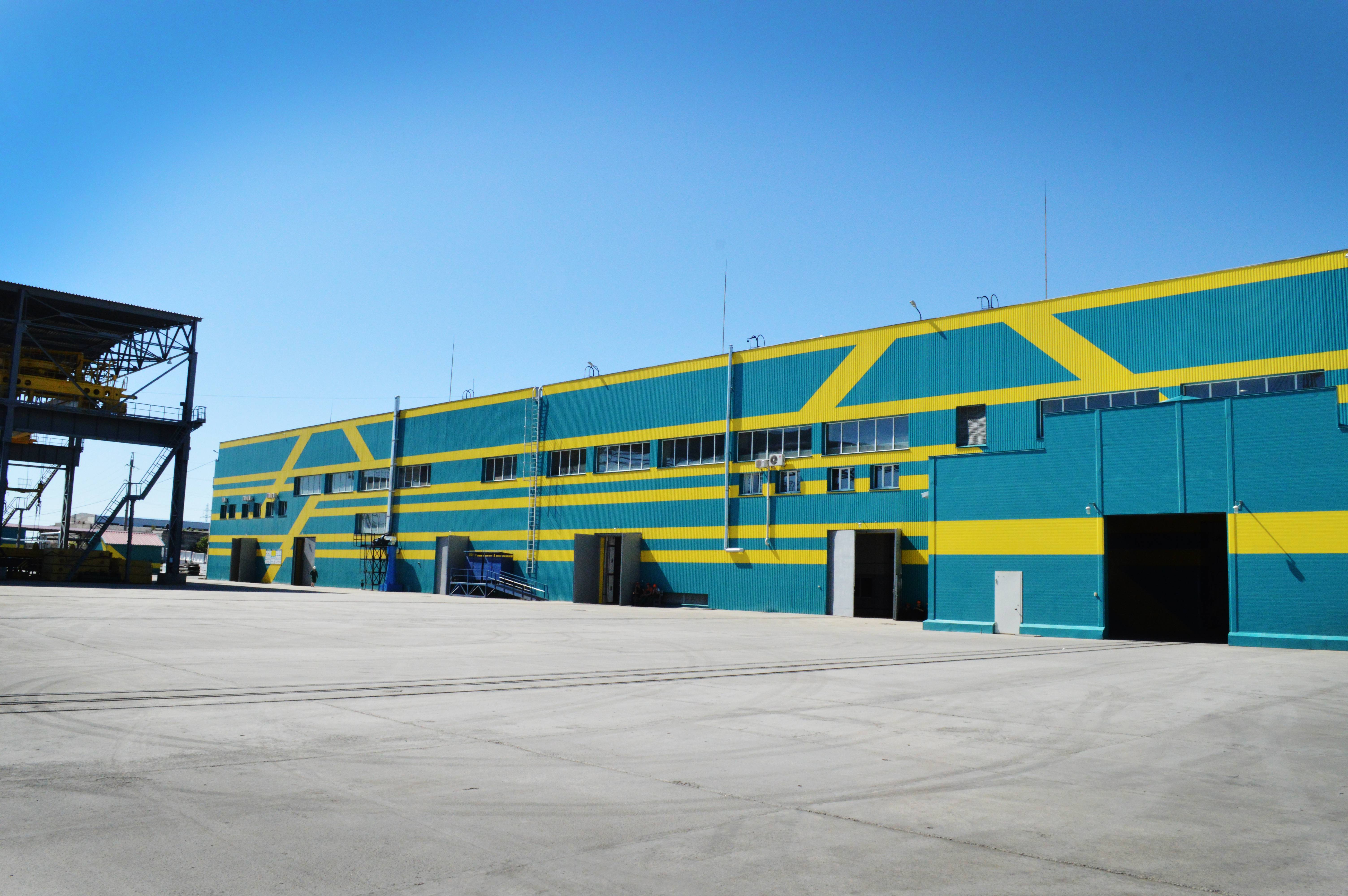 общий вид завода ТОО Проммашкомплект